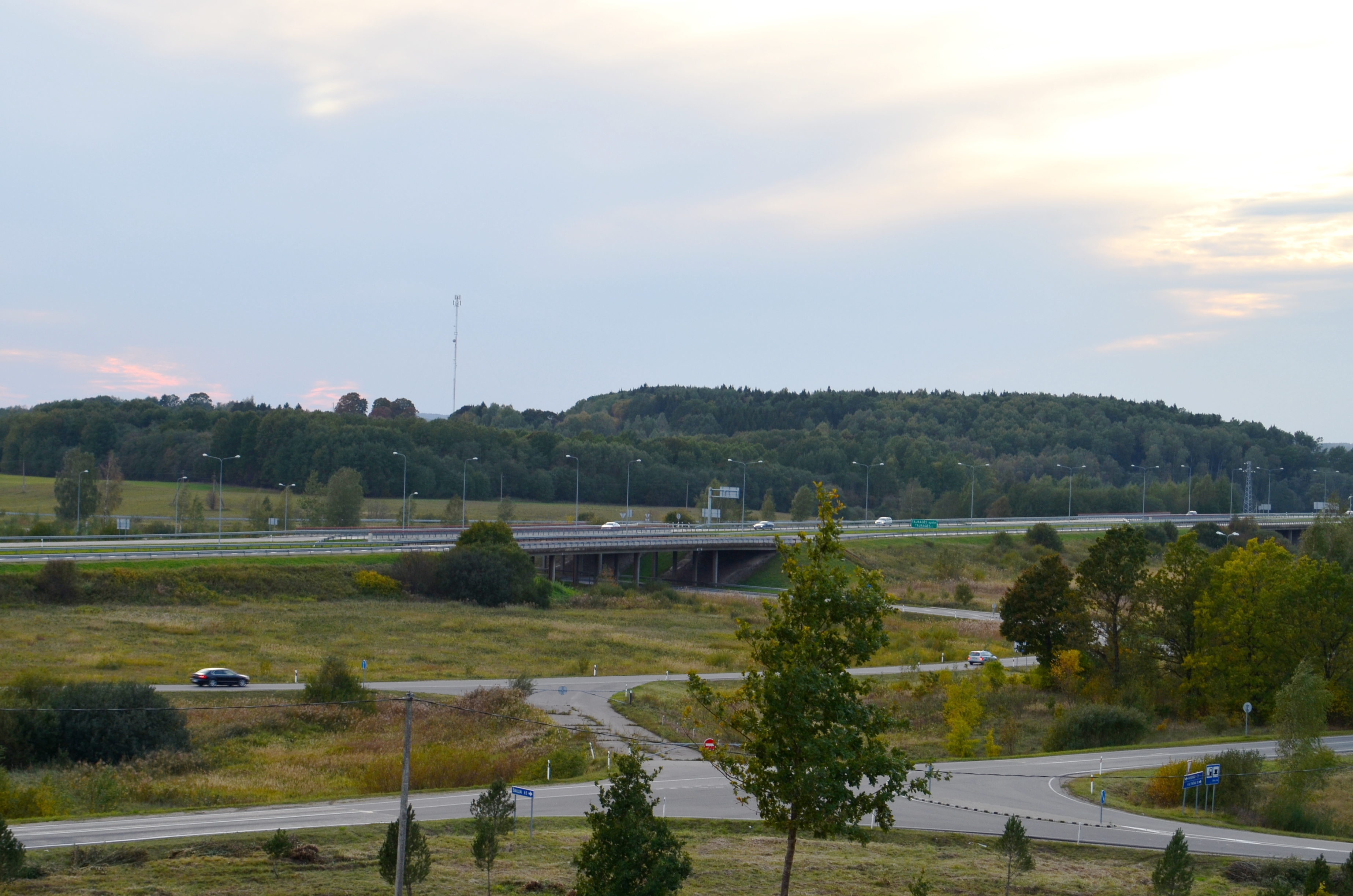 Kryžkalnio kryžkelė, Raseinių raj.